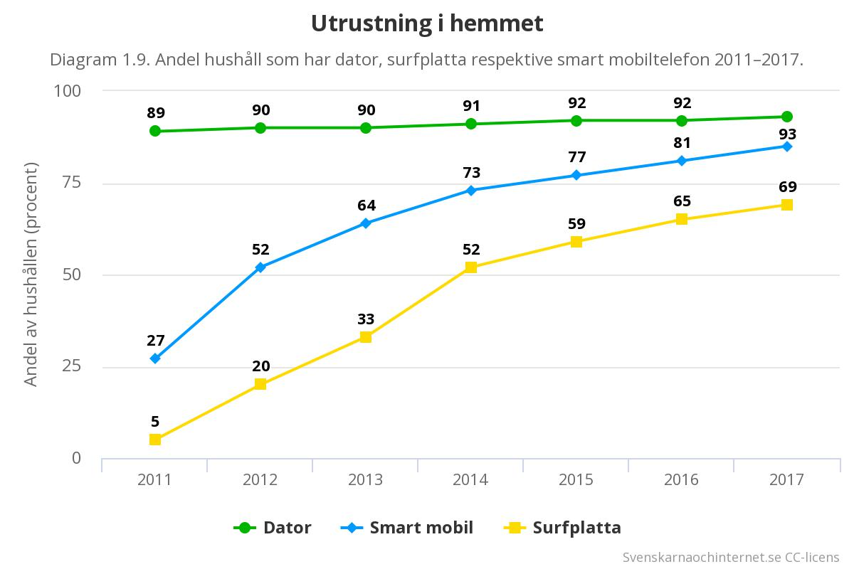 Andel svenska hushåll som har dator, surfplatta, respektive smart mobil 2011–2017. Siffror från undersökningen "Svenskarna och internet".